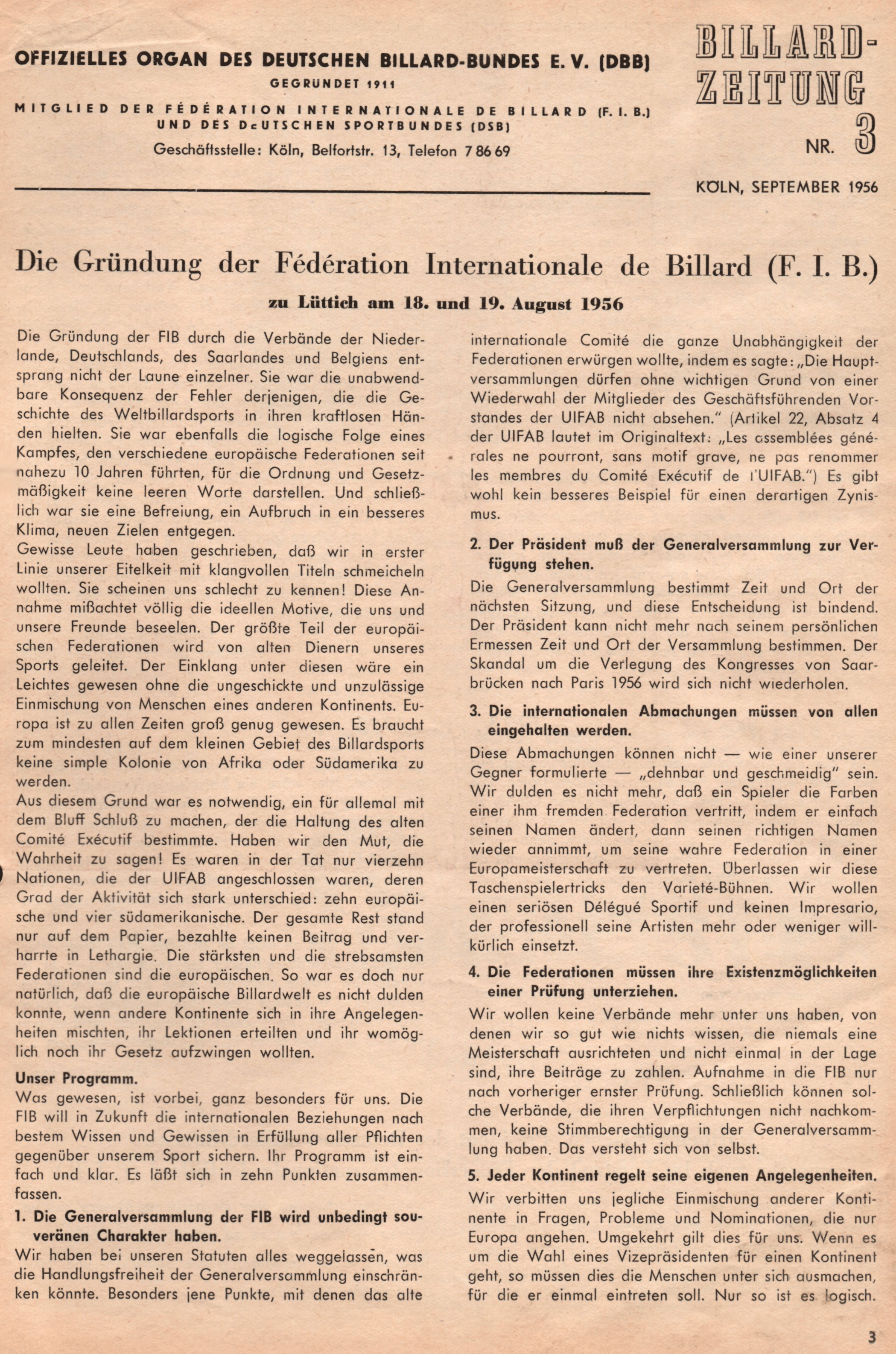 see file name